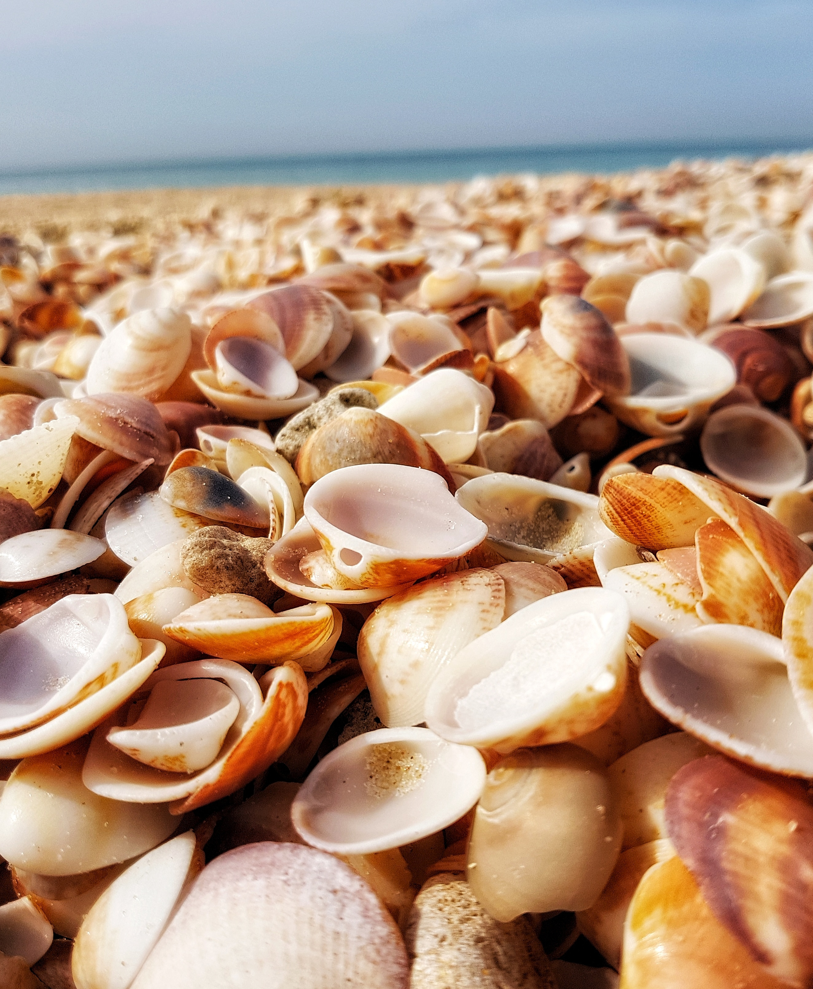 חוף פלמחים הוא חוף ים השוכן במישור החוף הדרומי, מדרום לראשון לציון ולנחל שורק, ליד קיבוץ פלמחים. אזור החוף הוכרז כגן לאומי.